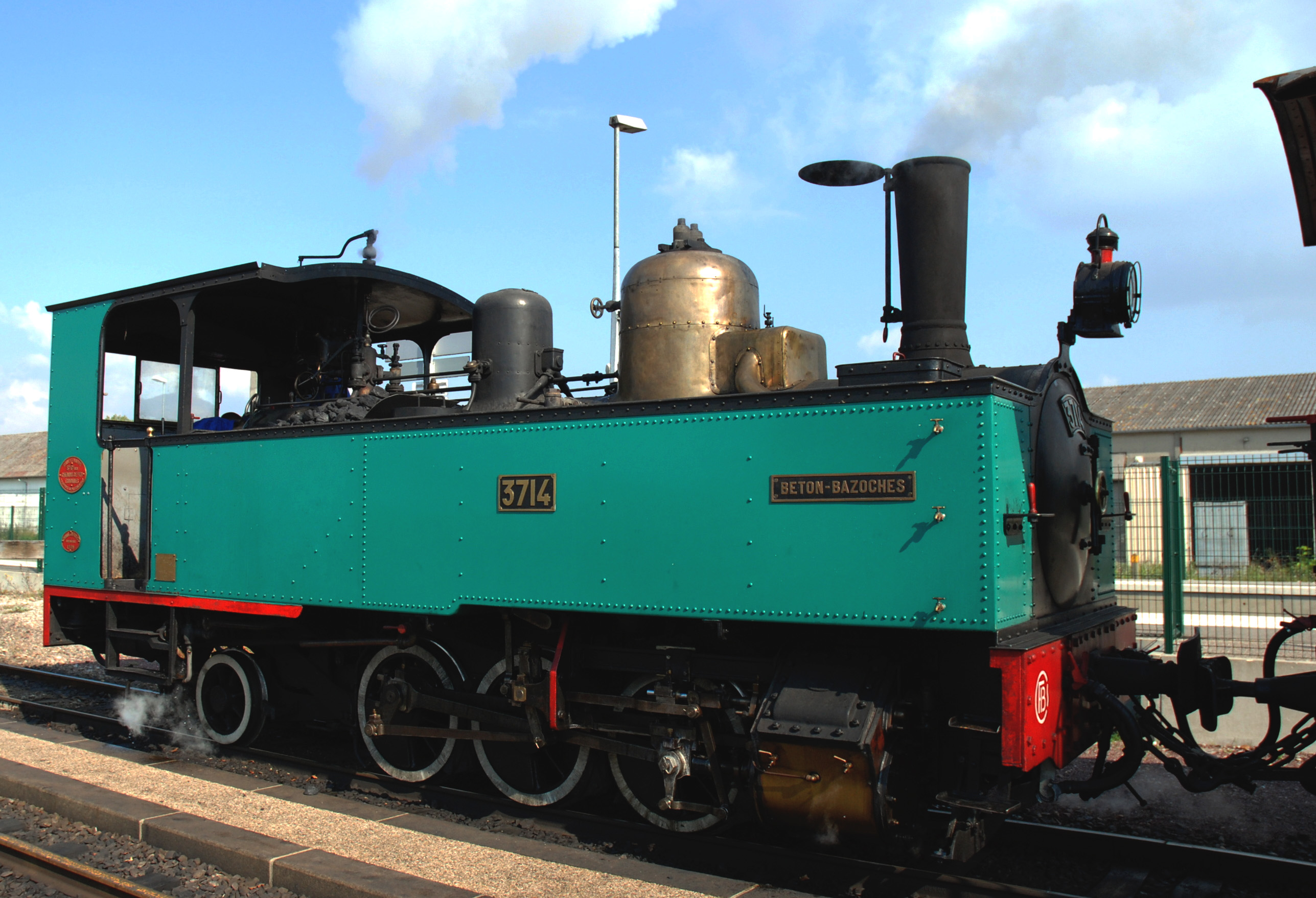 stoomtrein gebouwd door Buffaud & Robatel in 1909 in het station van Noyelles-sur-Mer (Frankrijk) die Cayeux-sur-Mer met Le Crotoy verbindt